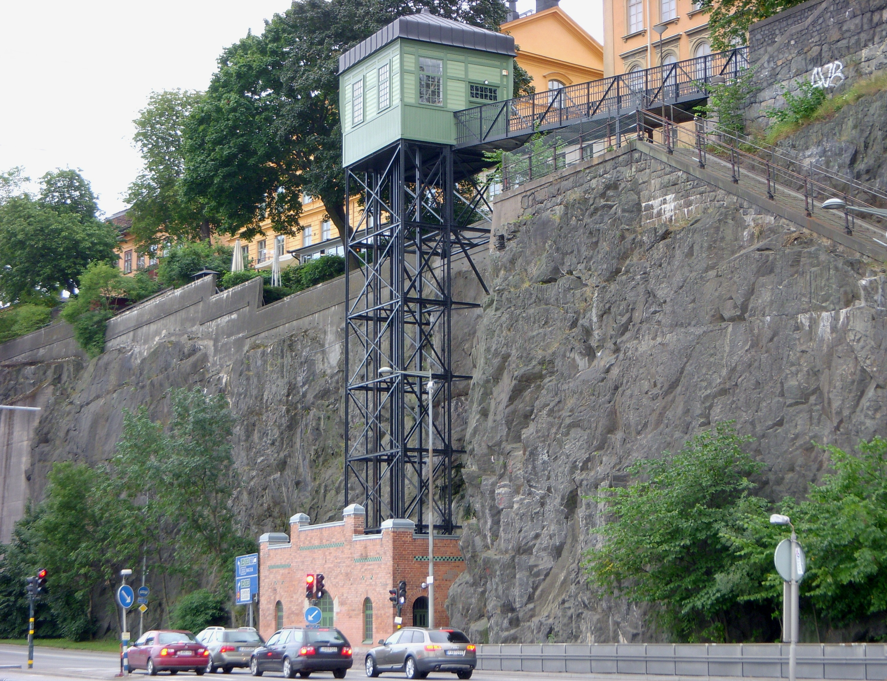 Stadsgårdshissen på Södermalm i Stockholm, bild från 2009